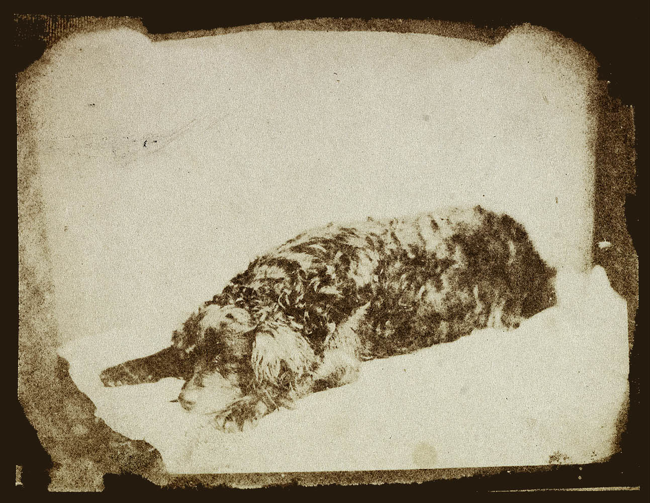 Nicolaas Henneman (1813—1898). Miss Mitford's Dog